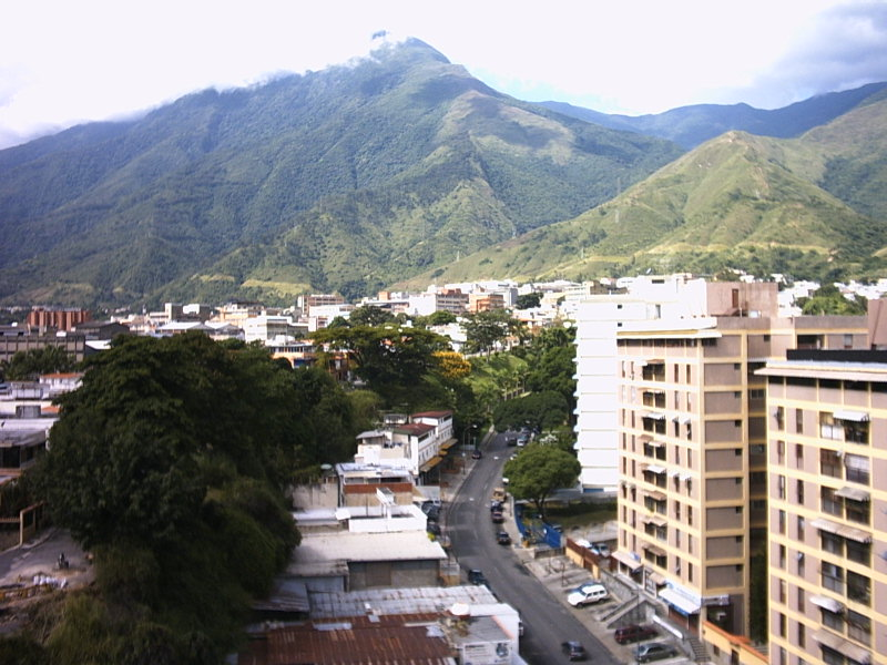 El Ávila from El Marqués, Caracas, Venezuela